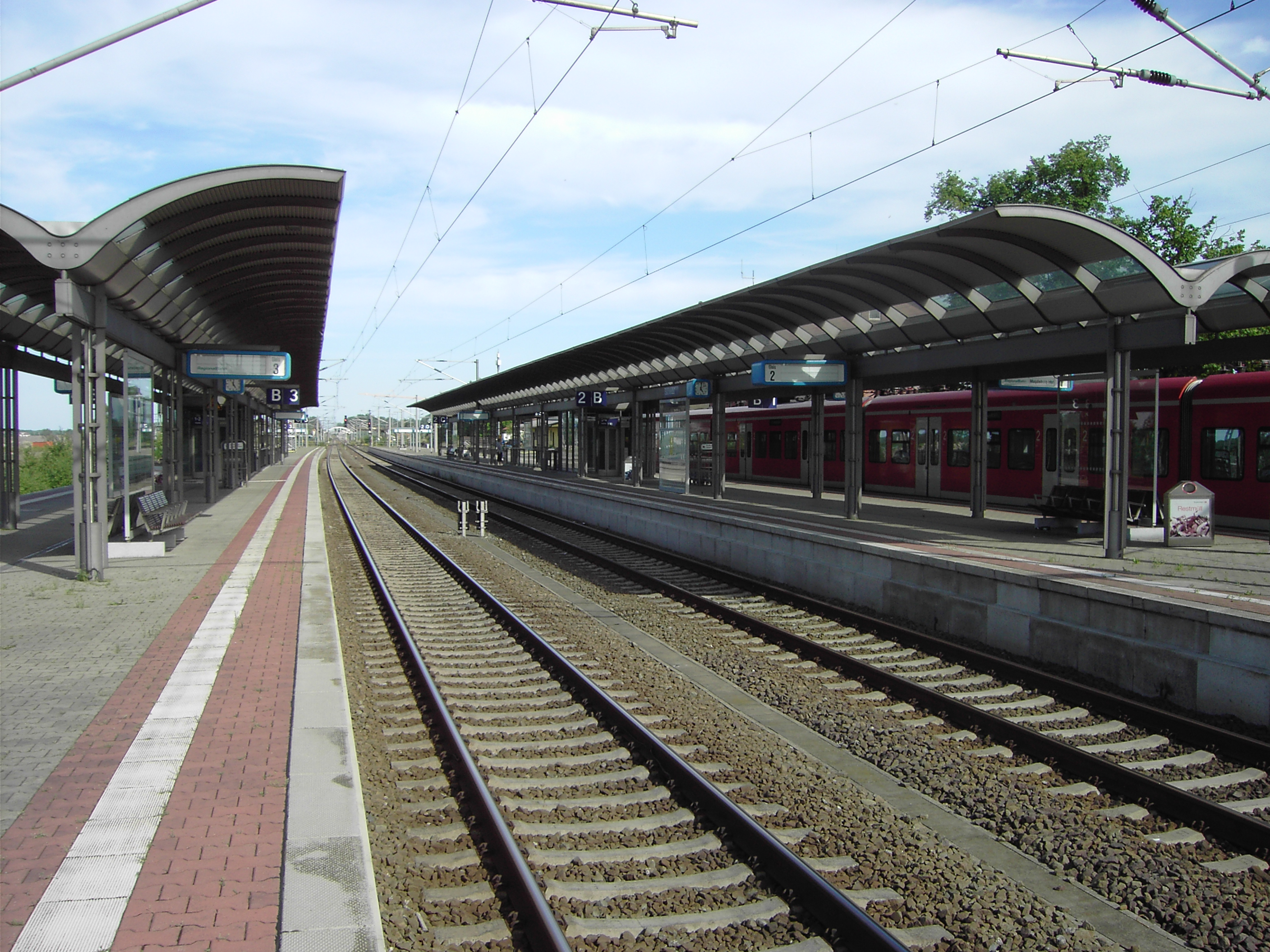 Bahnhof Salzwedel, Gleise 2 und 3